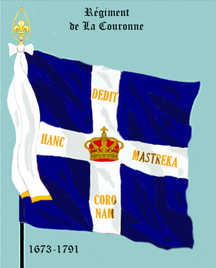 Ordonnanzfahne eines königlich französischen Infanterie-Regiments. - Entnommen und überarbeitet aus: „LES UNIFORMES ET LES DRAPEAUX DE L'ARMÉE DU ROI“ Marseille 1899. (Drapeau d'Ordonnance d' un régiment française d'infanterie royale.)